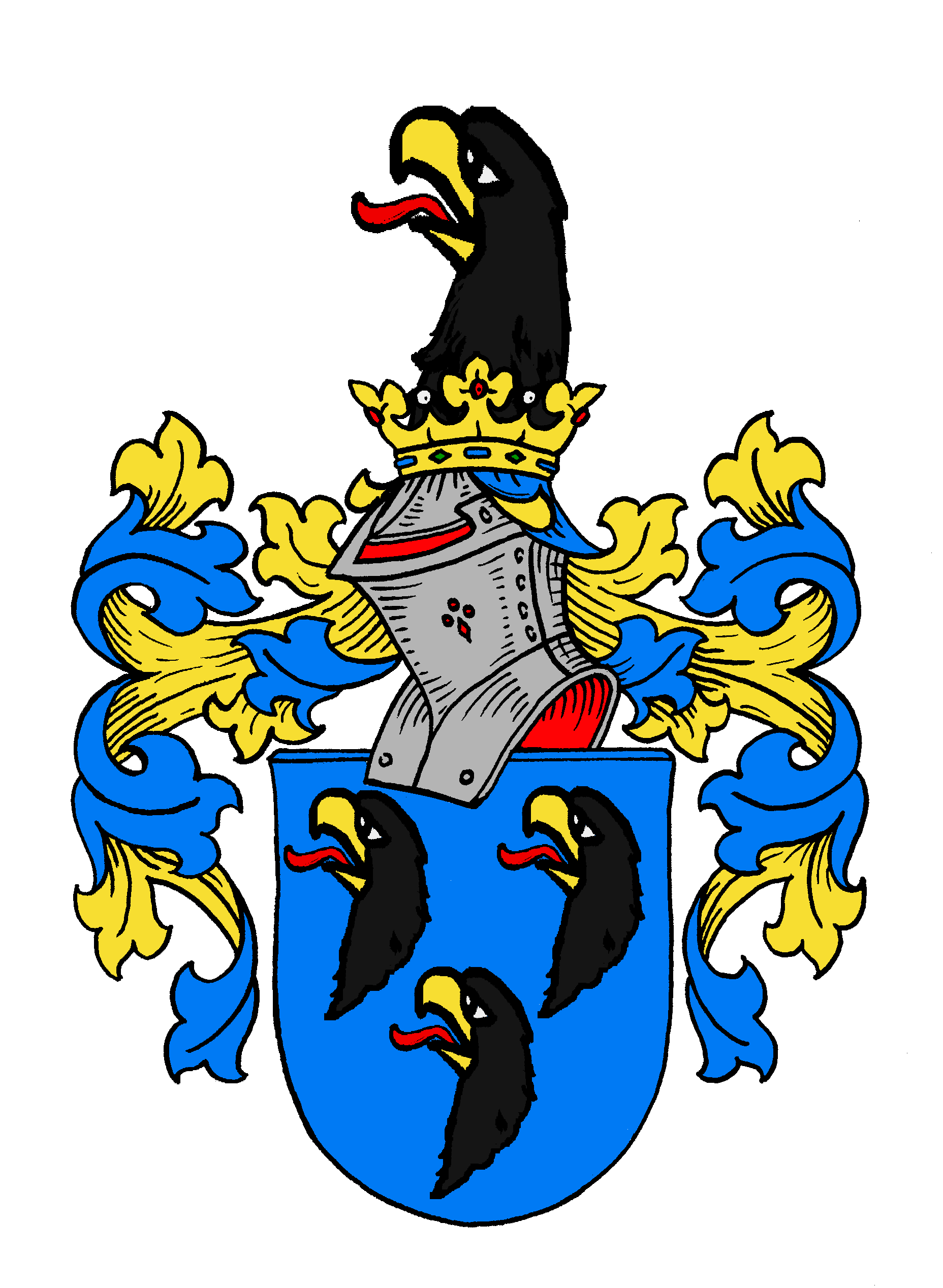 Familienwappen der Keller, Ratsgeschlecht der Reichsstadt Esslingen, später in herzoglich württembergischen Diensten, etc., wie es die Brüder Matthäus Keller (1620-1661), Apotheker zu Nürnberg, und Johann Heinrich Keller (1622 - 1693), württemberg. Amtmann zu Gochsheim 1667, Vogt zu Laufen 1668 ff., in ihren Siegeln führten: File:Arolsen Klebeband 03 107 1.jpg; [1]